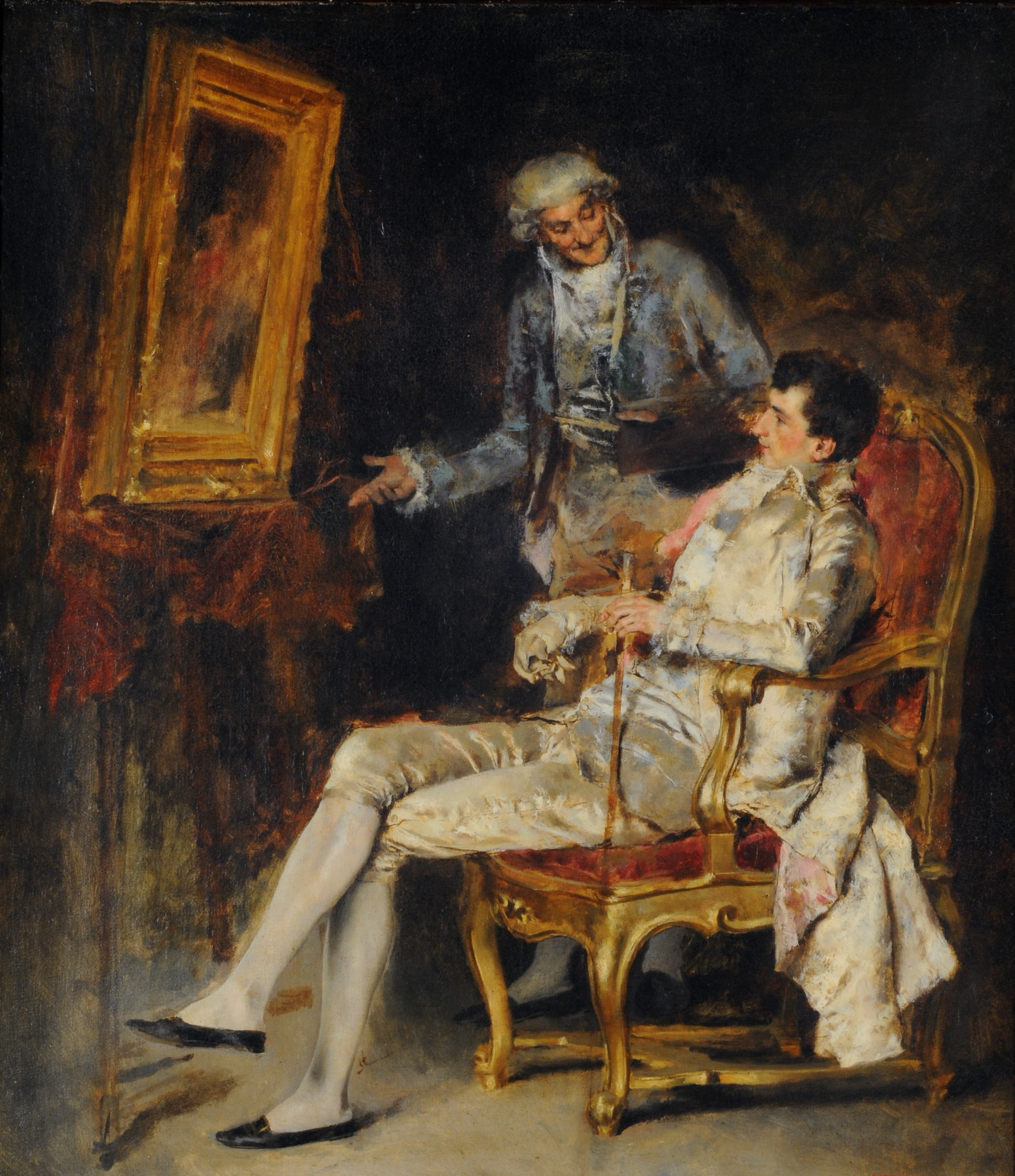 Antonio Casanova y Estorach, El Aficionado. Siglo XIX. 50 x 42 cm, óleo sobre tela. Inv. 6248.